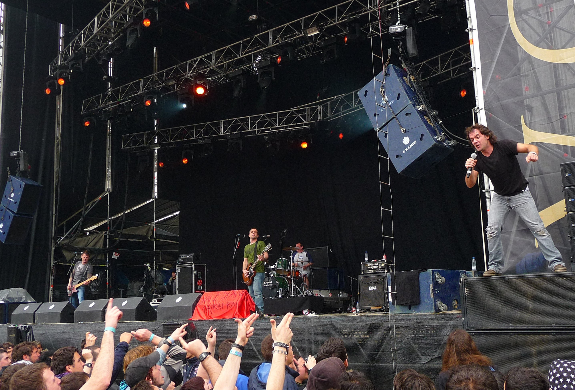 Lendakaris Muertos actuando en Extremúsika 2009. Mérida.